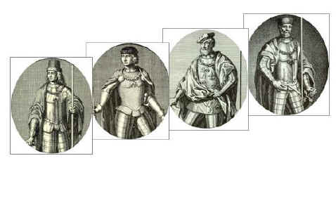 Heren van het Land van Beveren